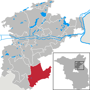 Werneuchen in Brandenburg (Country) - District Barnim